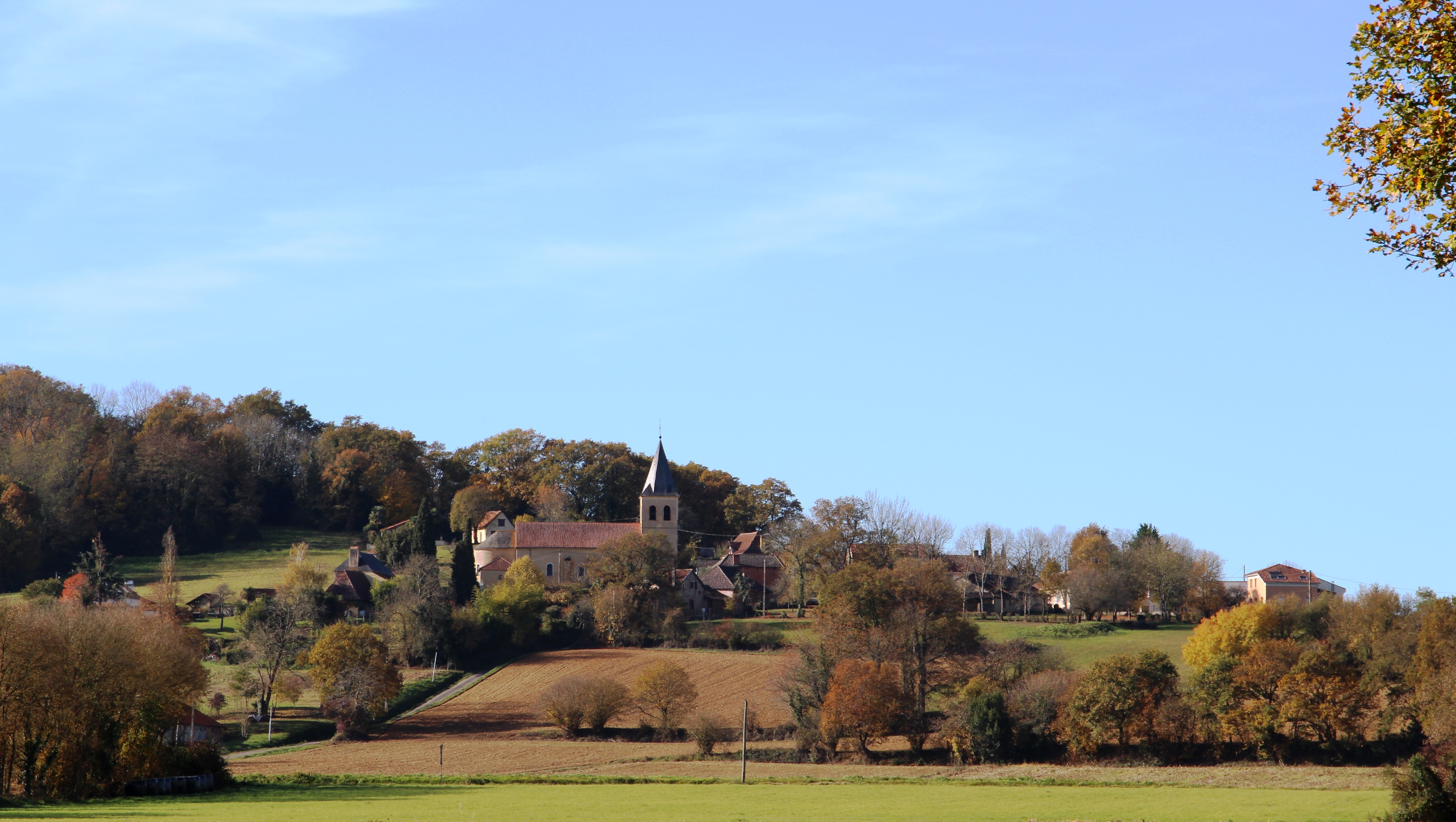 Vidouze (Hautes-Pyrénées)